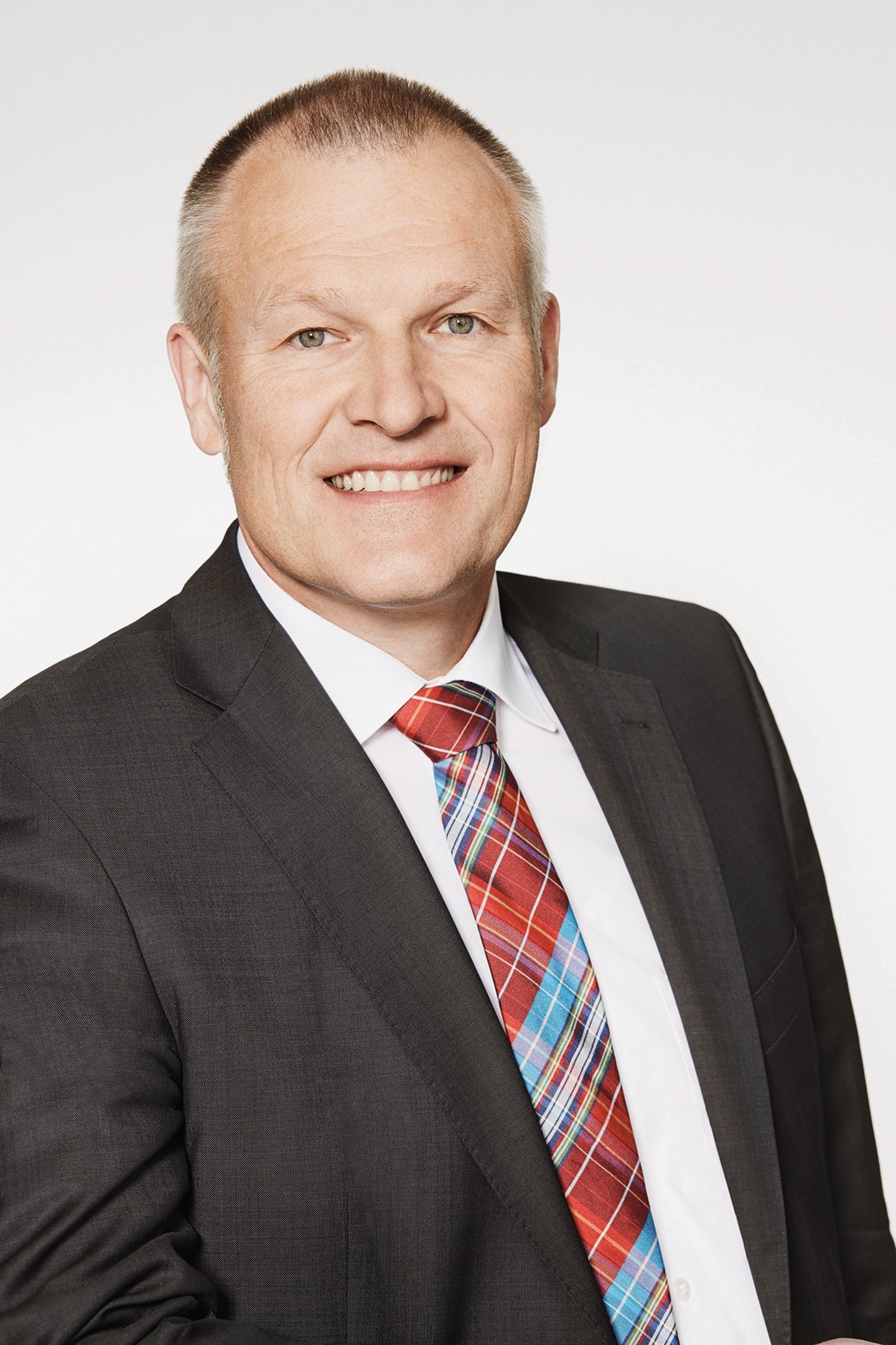 Rainer Hinderer SPD Landtagsabgeordneter BW